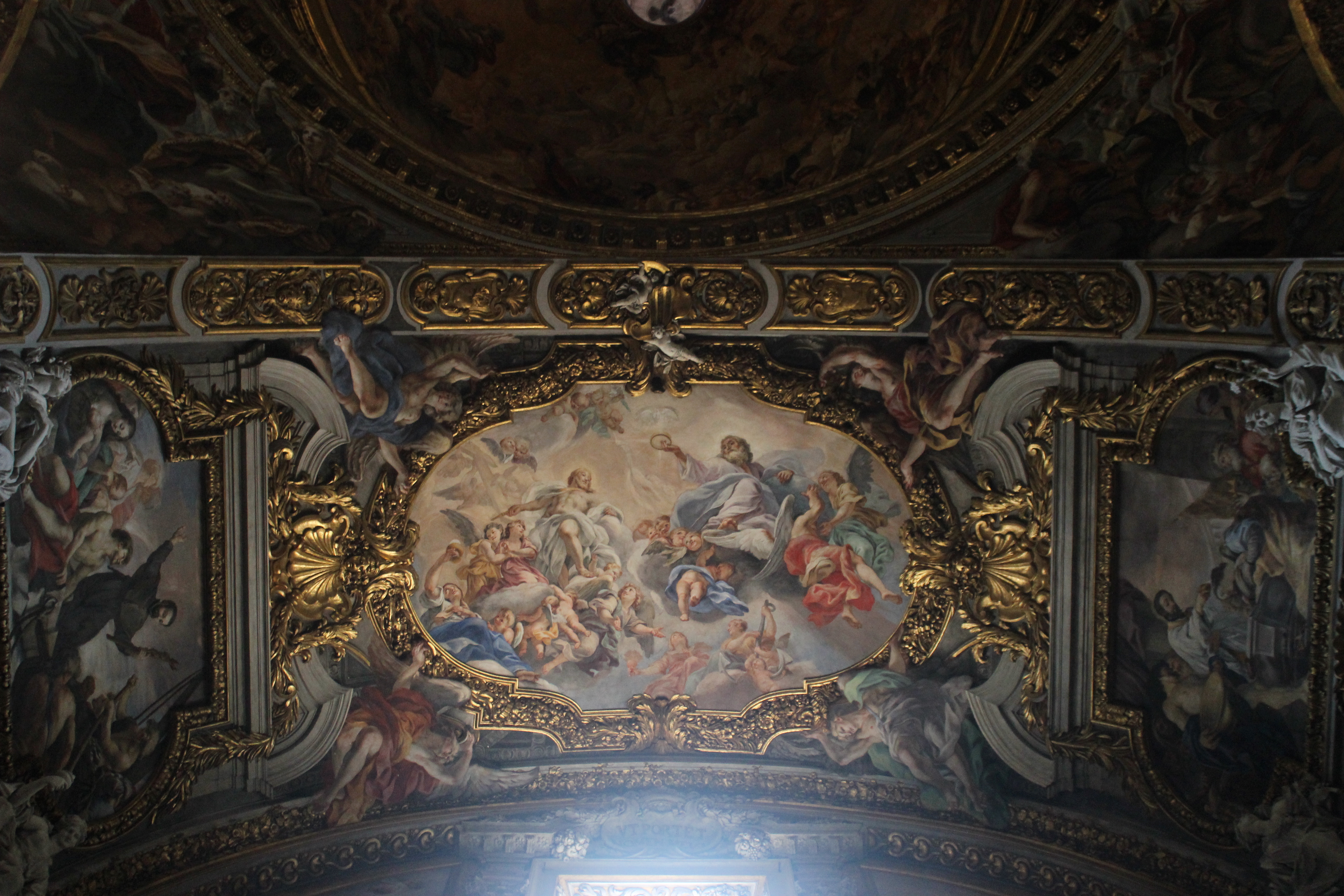 Roma. Il Gesù. Altar de San Francisco Javier.